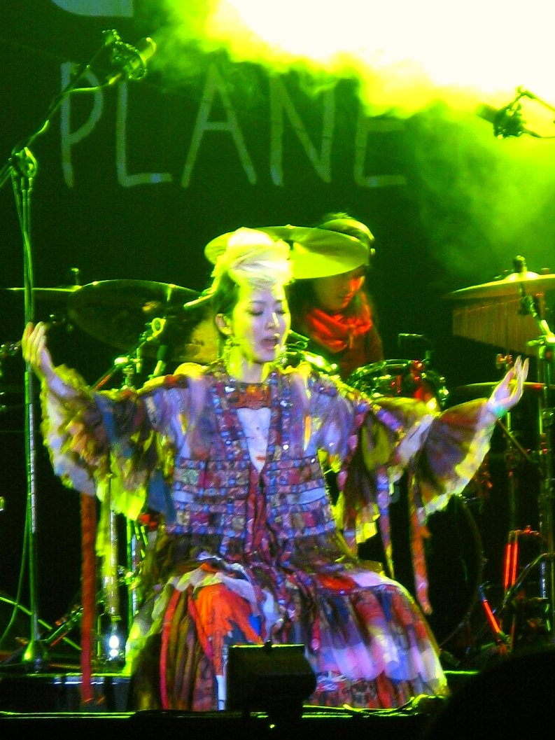 Sa Dingding (薩頂頂)